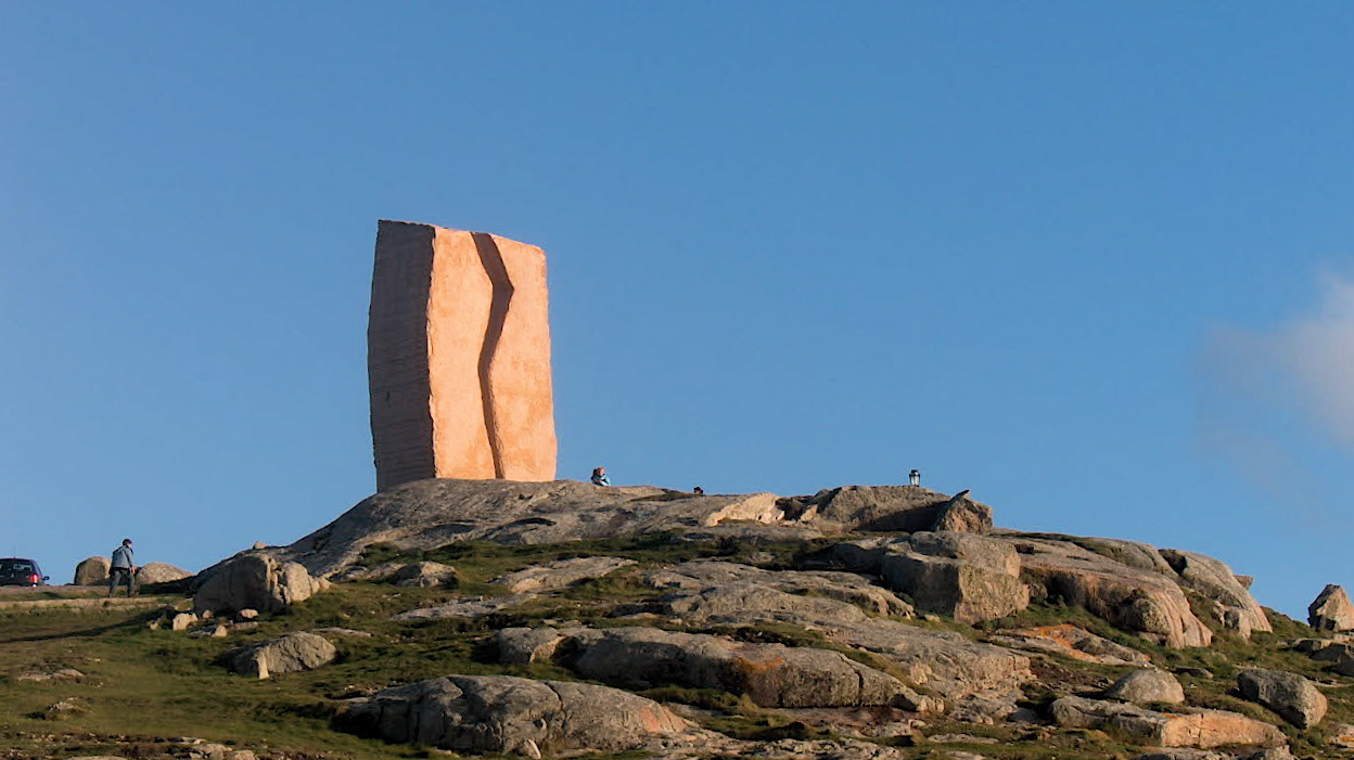 A Ferida, escultura de Alberto Bañuelos-Fournier en Muxía Categoría:Imaxes da escultura A Ferida